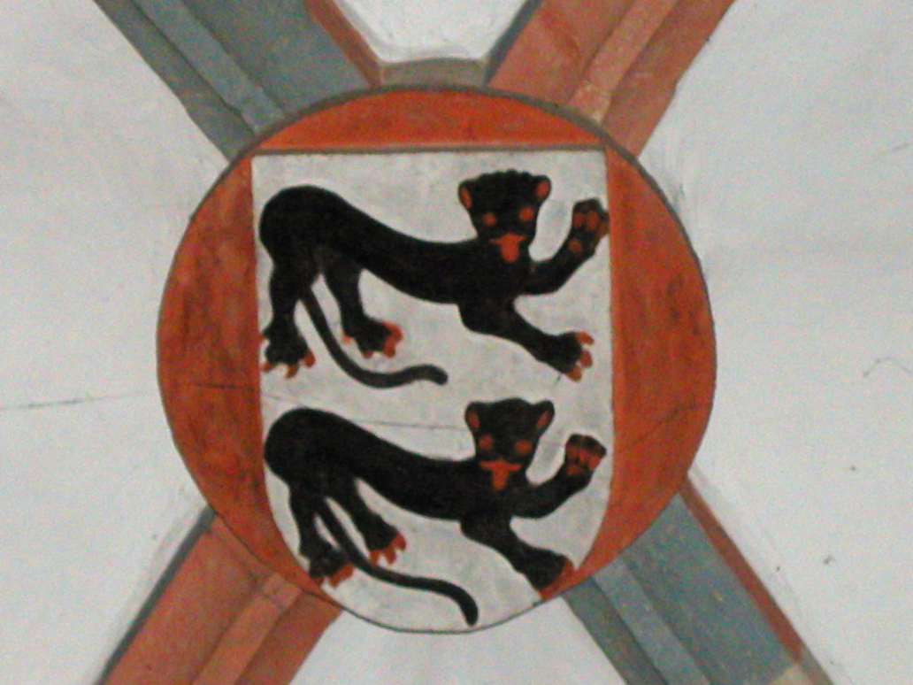 Schlußstein im Gewölbe der Stadtkirche von Weikersheim